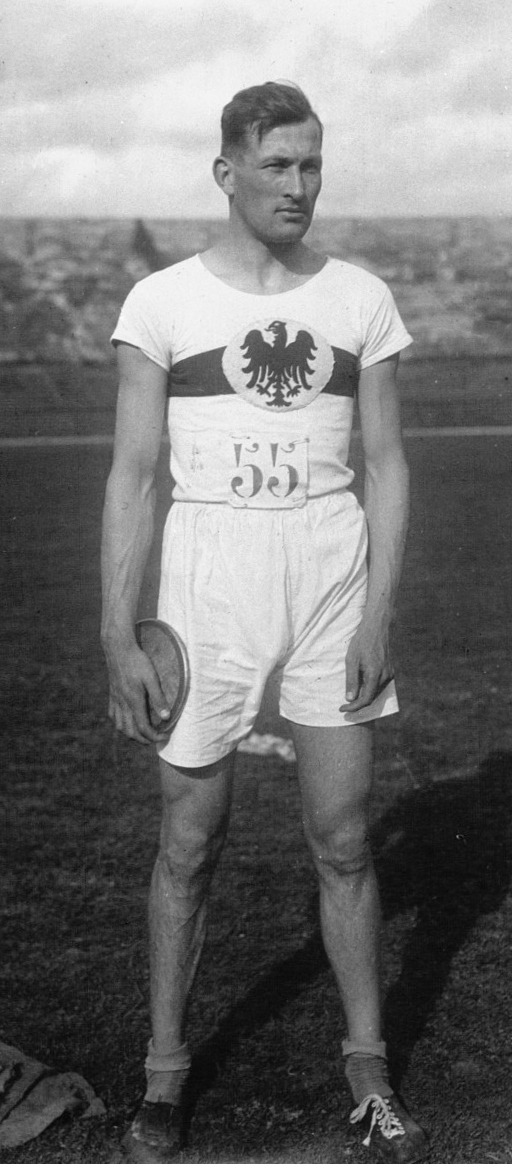 France-Allemagne : Hoffmeister (allemand) champion du disque : [photographie de presse] / Agence Meurisse